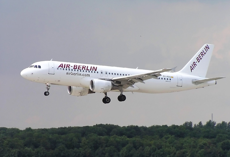 Air Berlin Airbus A320-200 (EC-KBQ) in Düsseldorf (EDDL)